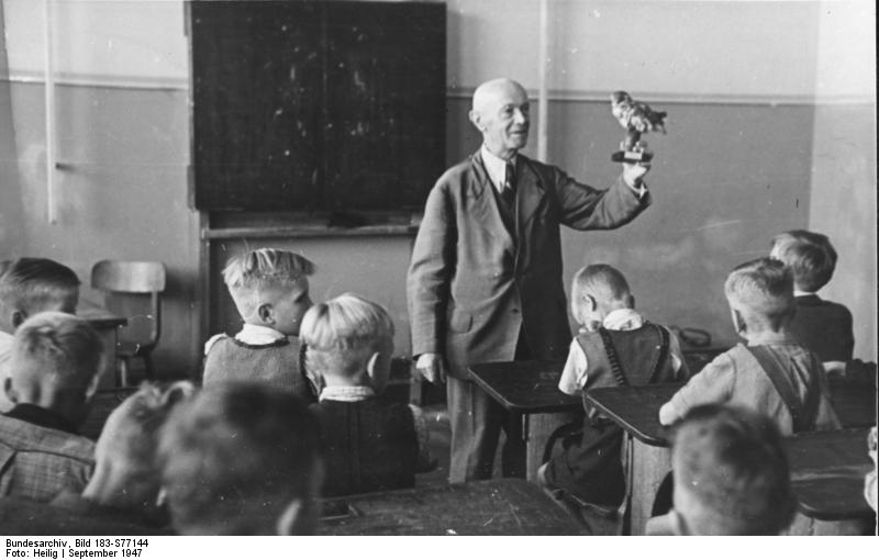 Schwerin, bei Naturkunde-Unterricht Illus - Heilig Naturkunde-Unterricht in der Gerhard-Hauptmann-Schule in Schwerin. September 1947